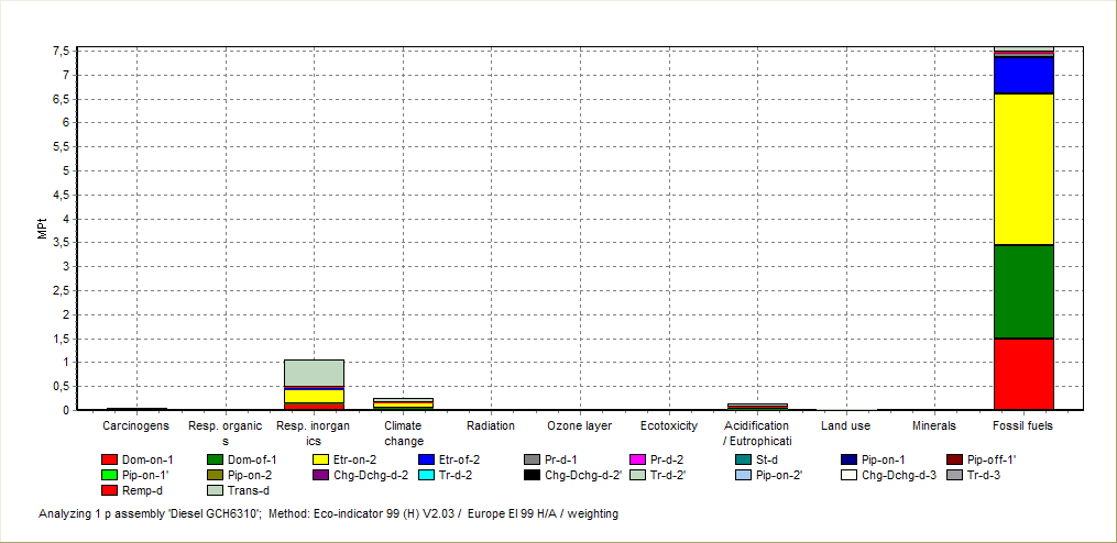 Exemple de résultat d'une analyse de cycle de vie du diesel à l'étape de la pondération. Cette analyse prend en compte toutes les étapes, de l'extraction à la consommation en tant que carburant. La caractérisation a été faite avec l'indicateur Eco-Indicator 99 Hierarchist selon les dix catégories proposées par Eco-Indicator. Les étapes dominantes en termes d'impact sont l'extraction du pétrole (Dom-on-1 : extraction onshore à dans le pays étudié, Dom-of-1 : extraction offshore à dans le pays étudié, Etr-on-1 : extraction onshore à l'étranger, Etr-of-2: extraction offshore à l'étranger ; chaque source répartie également) ainsi que la consommation du pétrole (trans-d). Une fois les catégories normalisées et pondérées, le principal impact est l'utilisation des ressources abiotiques/carburants fossiles. Auteur : Stéphane Guidoin, réalisé avec le logiciel SimaPro 6